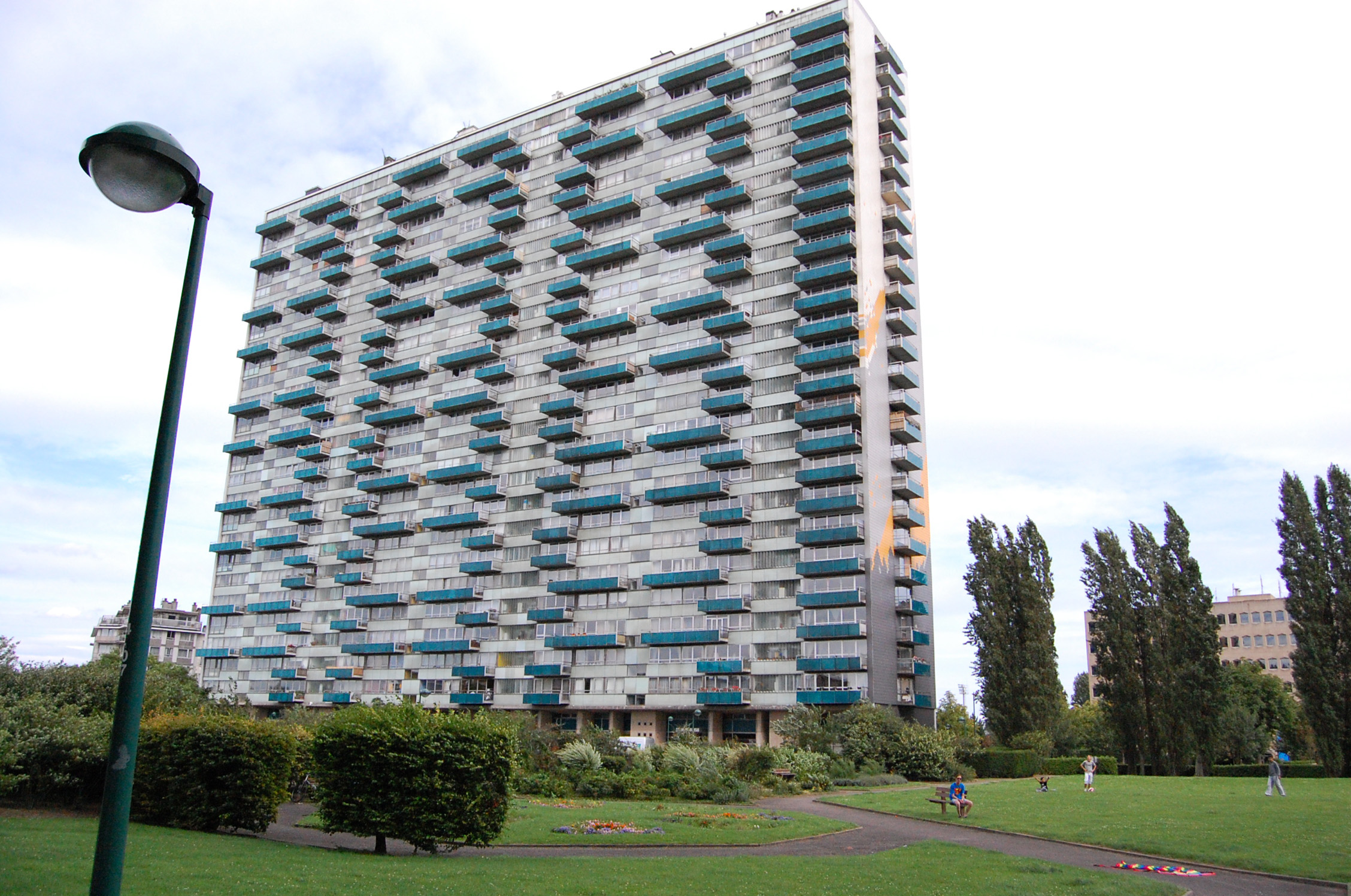 Tour L'Ecluse, boulevard Louis Mettewie, 1080 Bruxelles